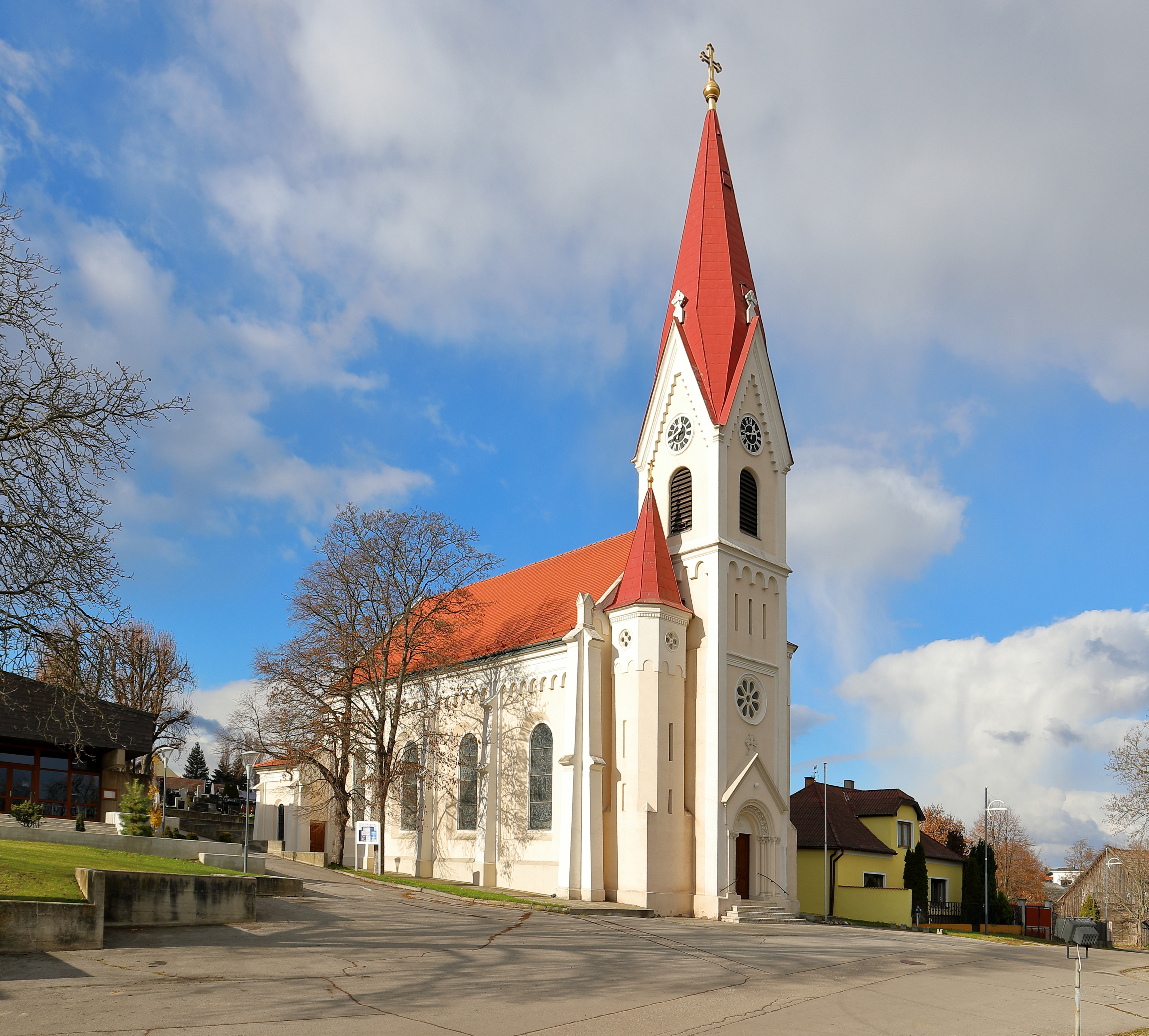 Südostansicht der röm.-kath. Pfarrkirche hl. Nikolaus in der burgenländischen Gemeinde Nickelsdorf.Die Kirche wurde ein wenig nördlich anstelle einer vor 1572 erbauten, zu kleinen und baufälligen Kirche ab 1904 errichtet und am 15. Oktober 1905 geweiht. Sie hat ein vierjochiges Langhaus mit Strebpfeilern, einen Ostturm, einen Treppenturm und einen eingezogenen Chor.